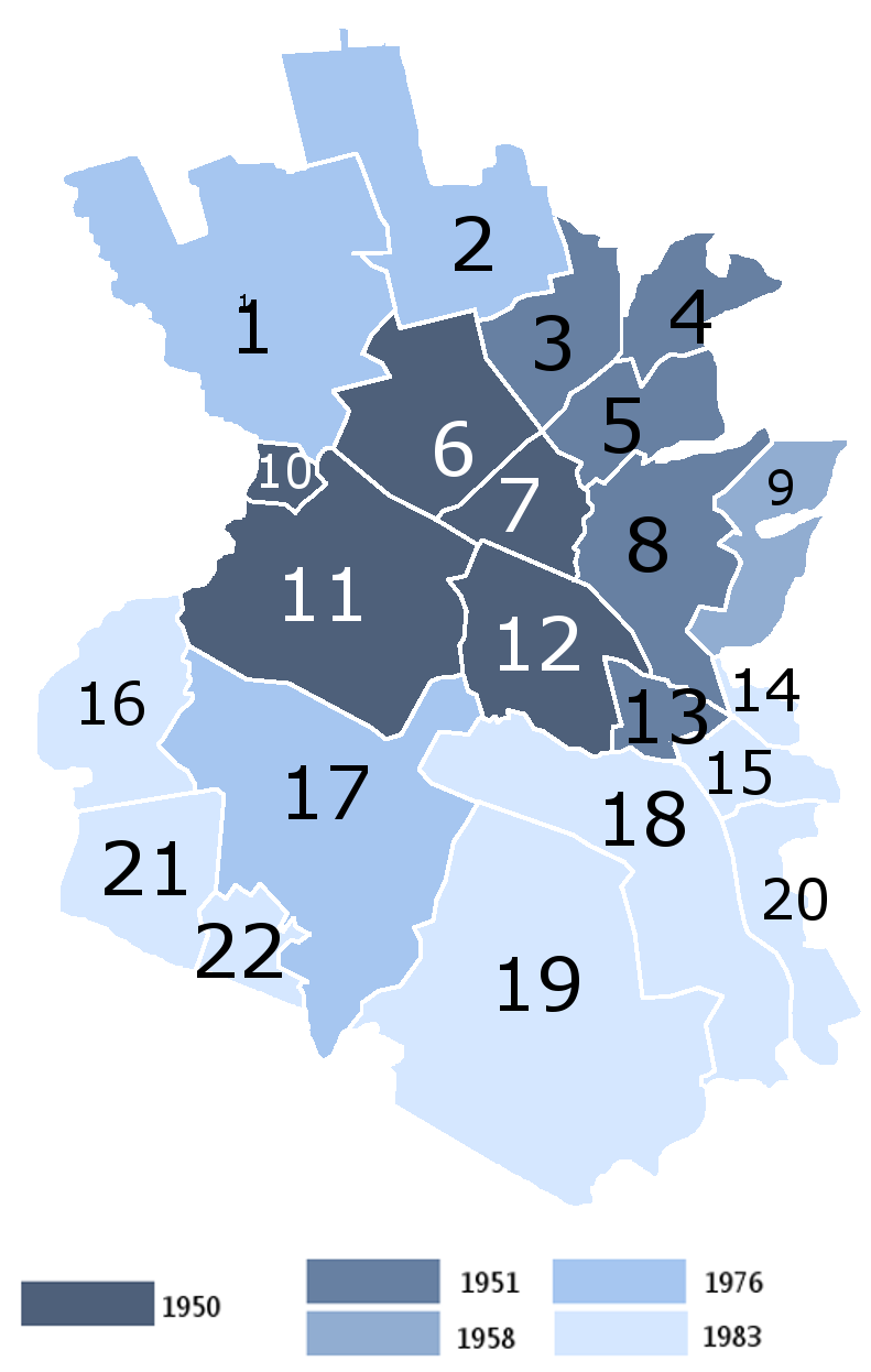 Graficzne przedstawienie rozwoju terytorialnego miasta Myszkowa